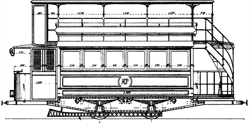 Motrice de tramway à plots de Romainville. On notera le patin de captage de courant en dessous de la caisse.